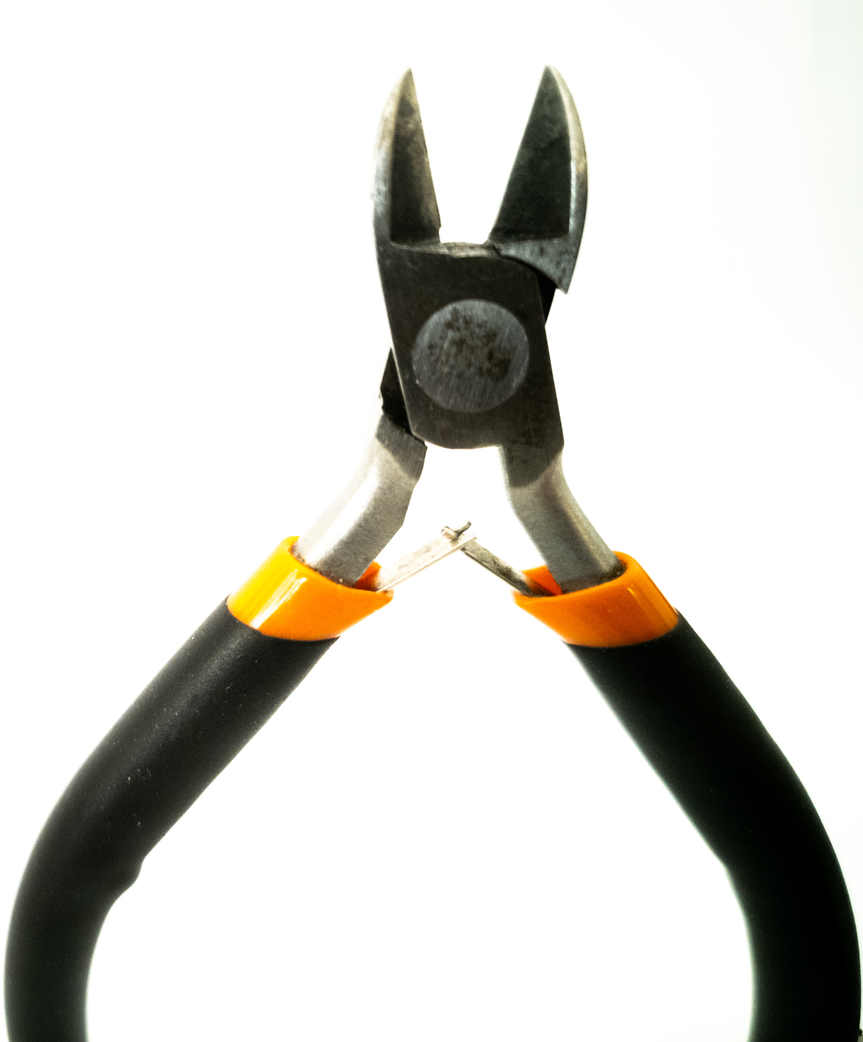 avbiter tile små tynne ledinger (denne har et kutt på maks 4mm ledningsnitt.